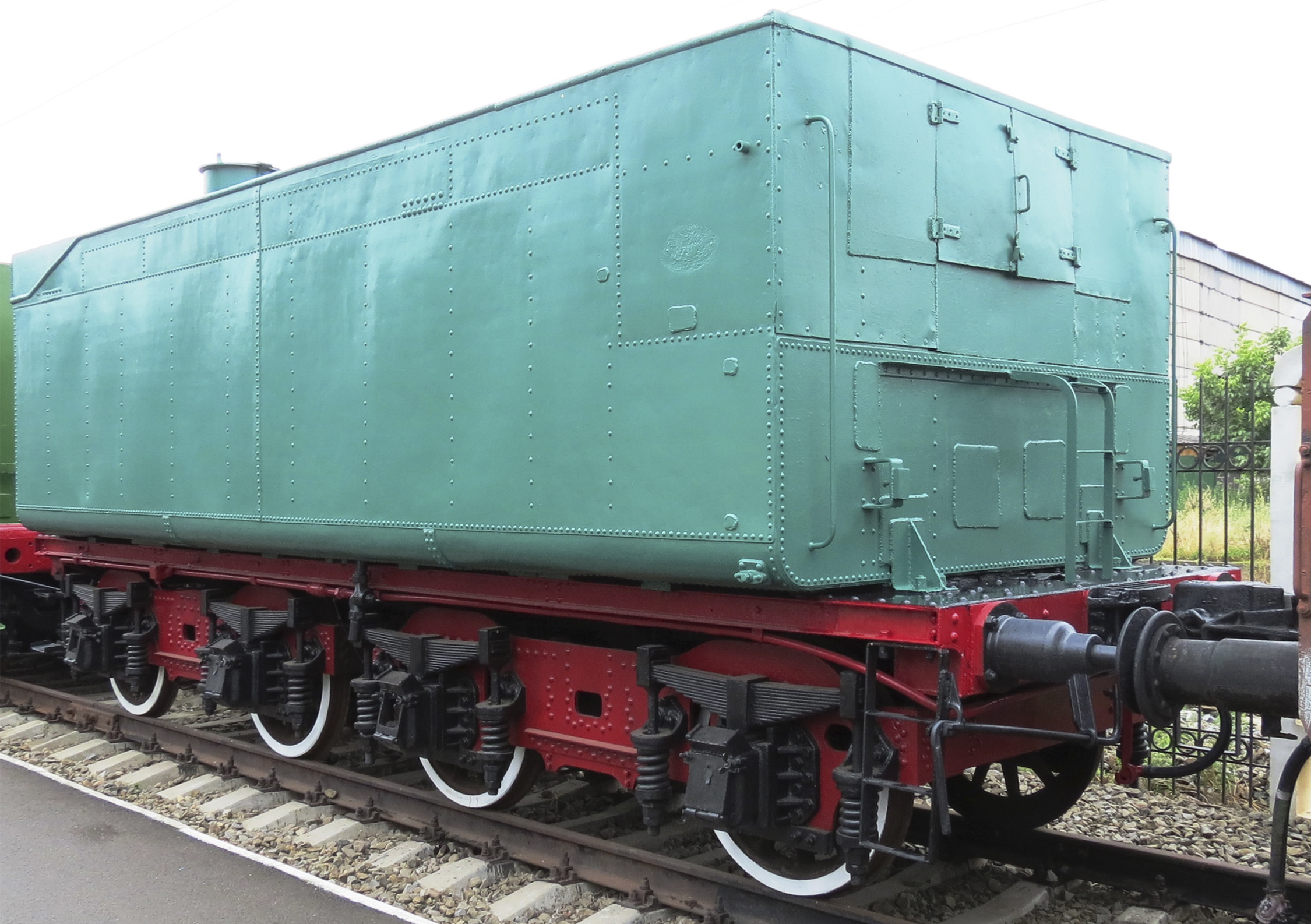 Тендер построен в 1925 году заводом Красный Путиловец